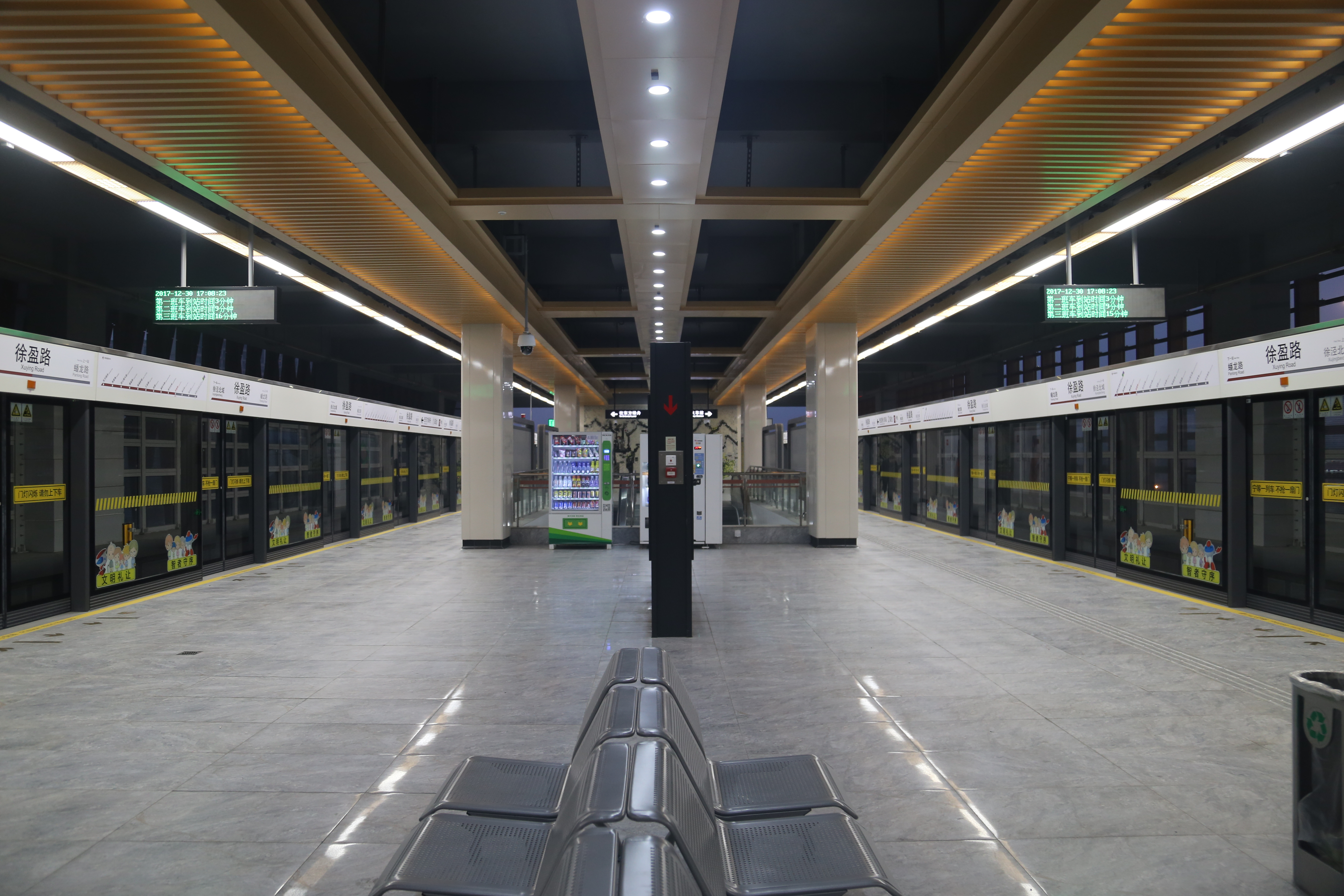 徐盈路站站台